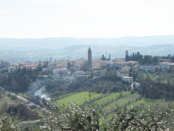 Panorama di Nereto (Teramo)